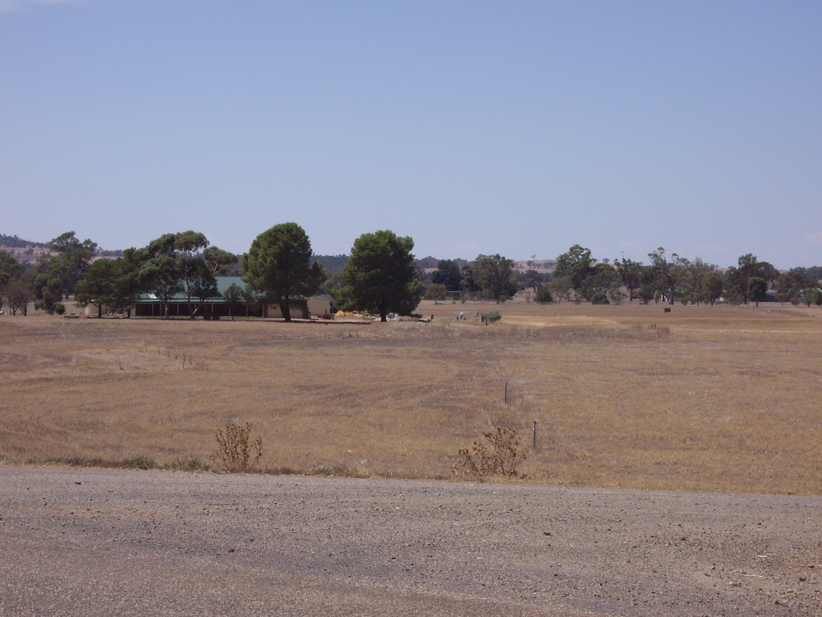 Malebo valley